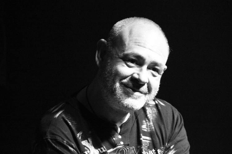 Retrat fotogràfic de Jorge Larena